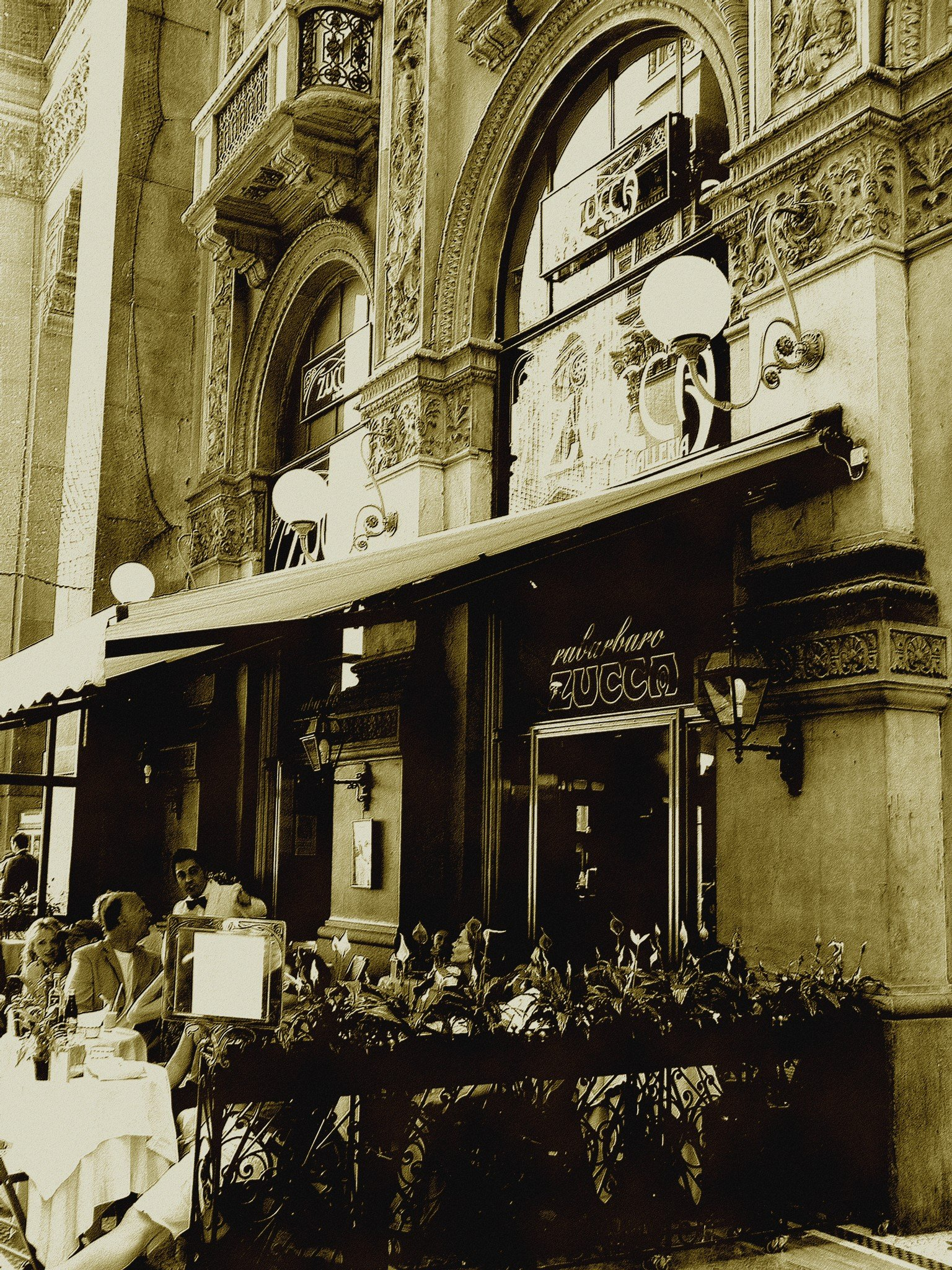 Caffè Zucca, Milano - Italia.